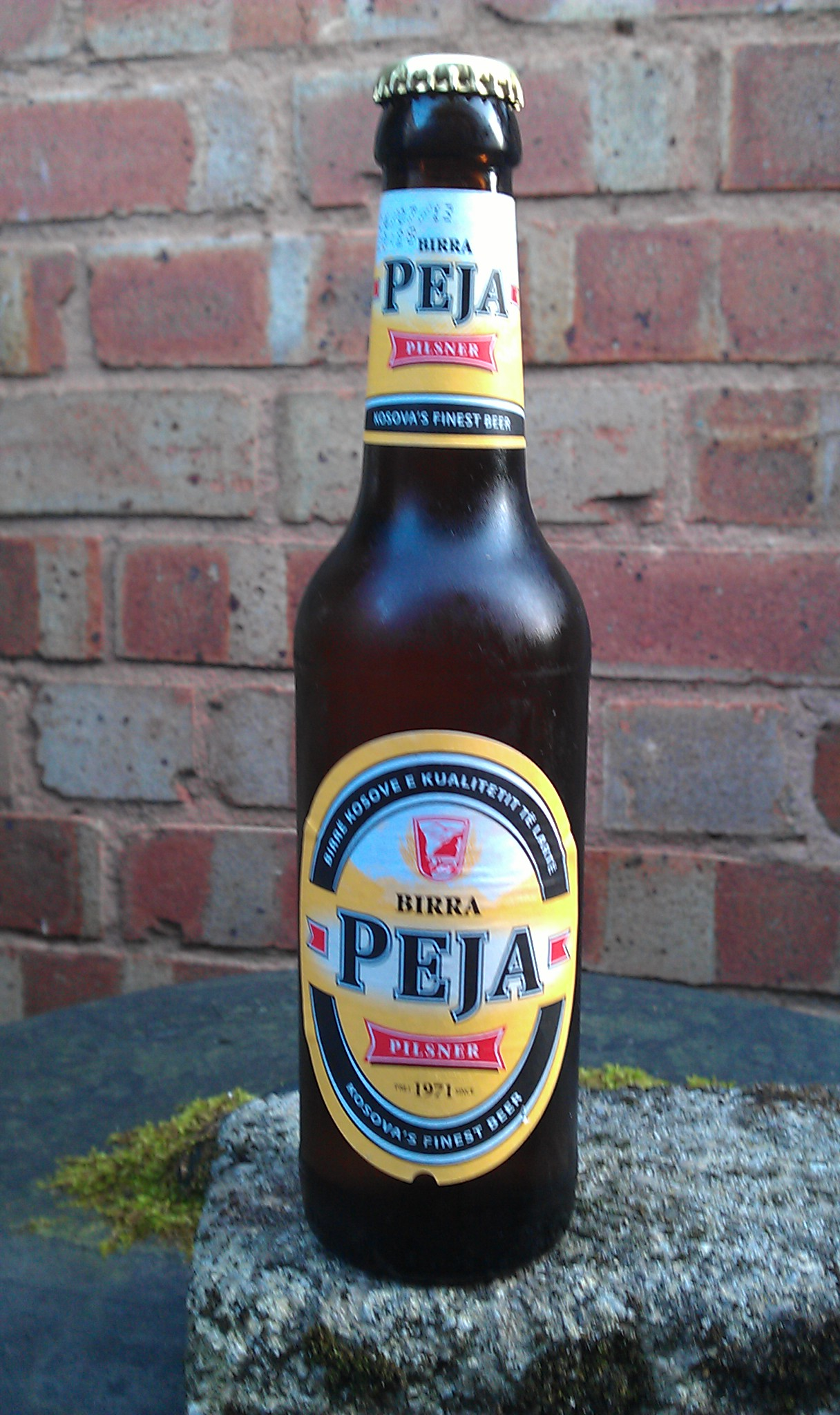 Peja pilsner beer, from Kosovo